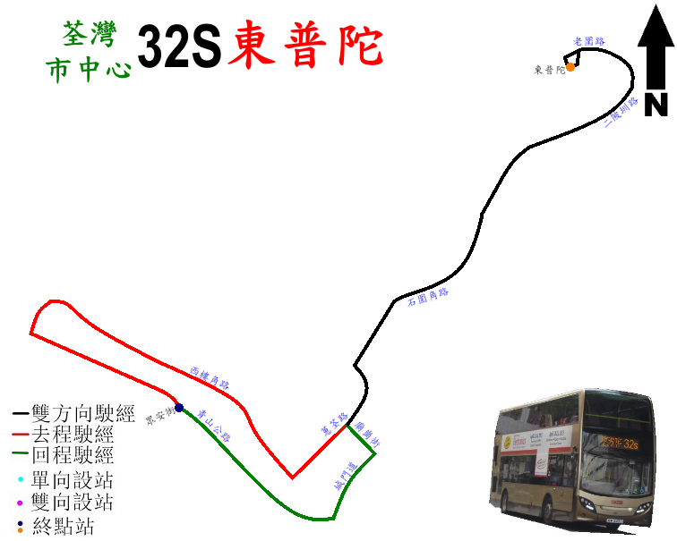 中文（香港）: 九巴32S線的走線圖